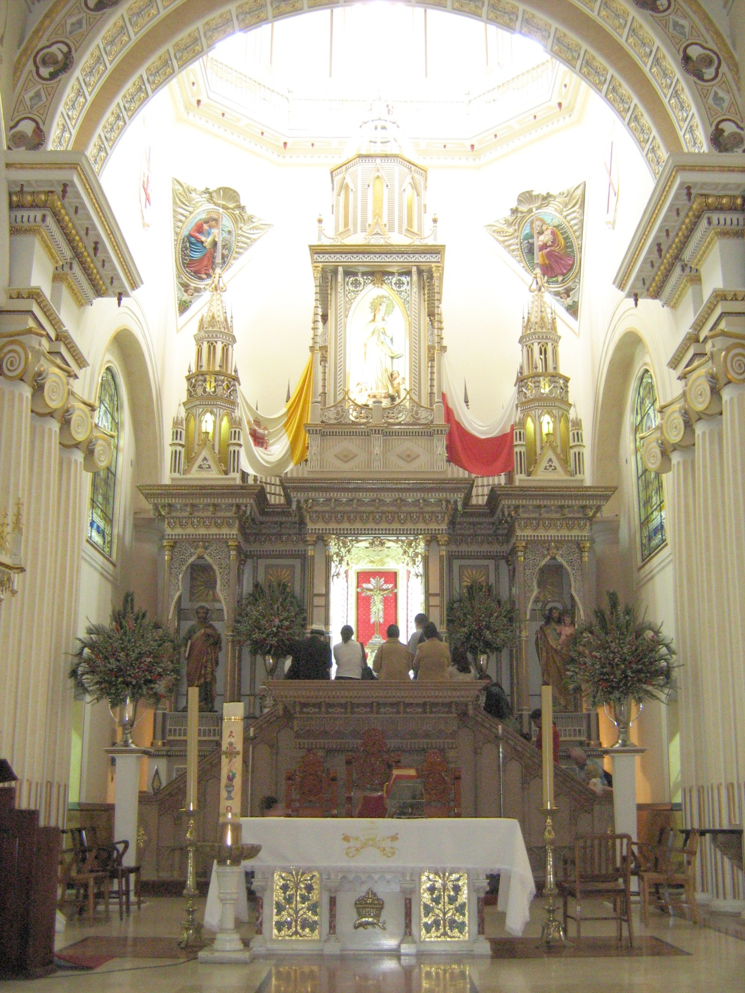 Altar Mayor de la Basílica Menor del Señor de los Milagros del municipio de San Pedro de los Milagros. Antioquia. Colombia